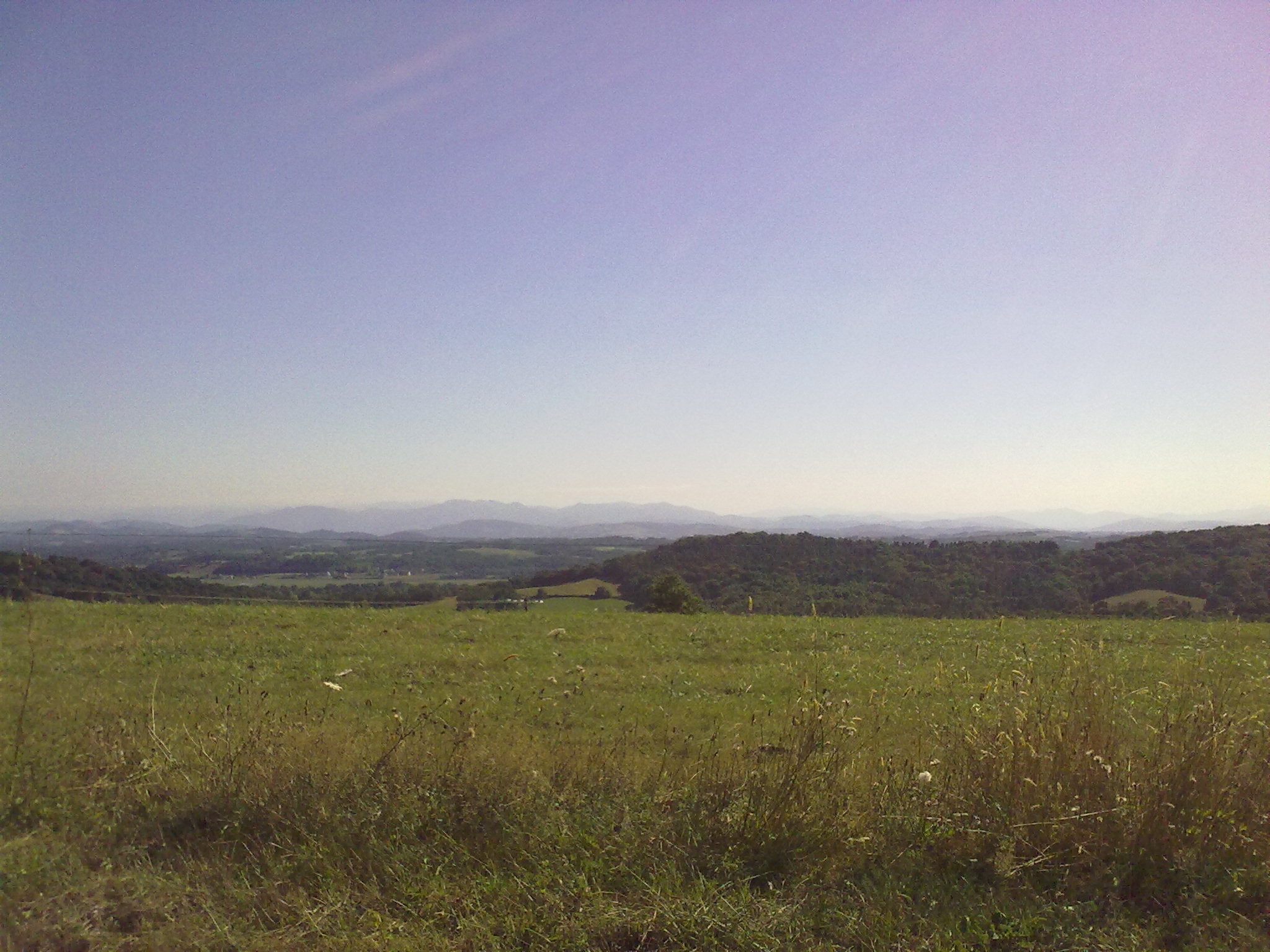 Castetbon le 18 juillet 2010, France.